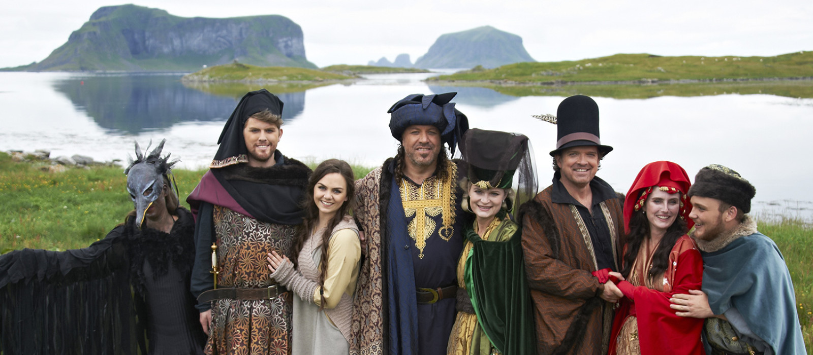 De medvirkende i Querinioperaen (Henning Sommerro) 2012 fotografert på Grimsøya